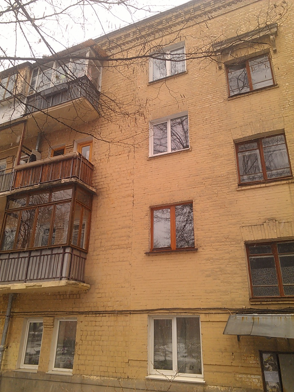 КВВАИУ, Киев, Украина. Жилой корпус 7. Средняя часть была разбомблена во время 2-й мировой войны.На фото видна вертикальная граница в кладке кирпичной стены.